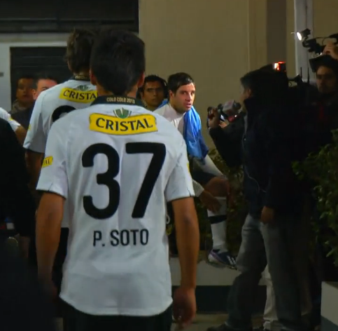 Pablo Soto Solis